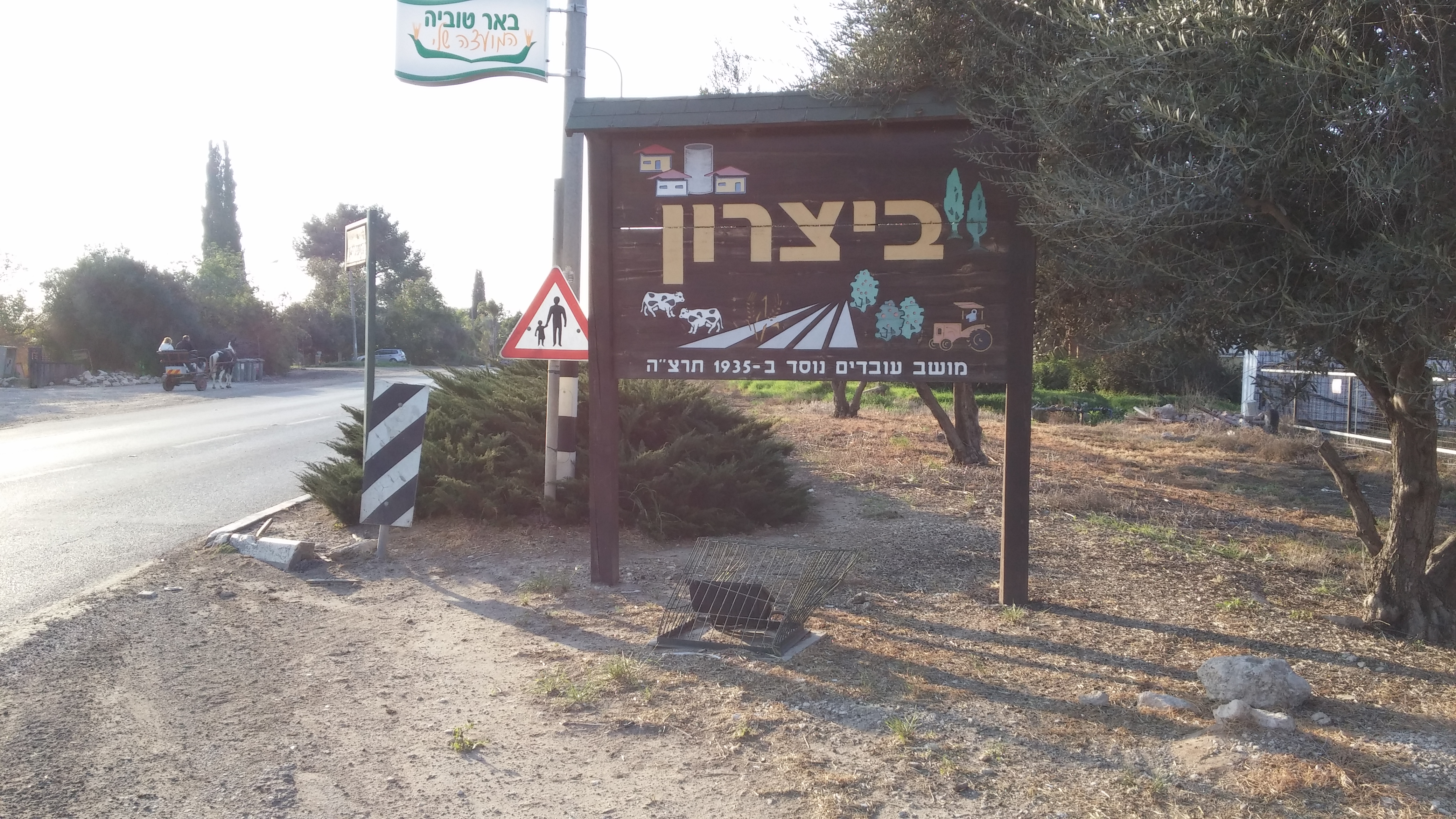 הכניסה למושב ביצרון השוכן במישור החוף הדרומי סמוך לגדרה בישראל